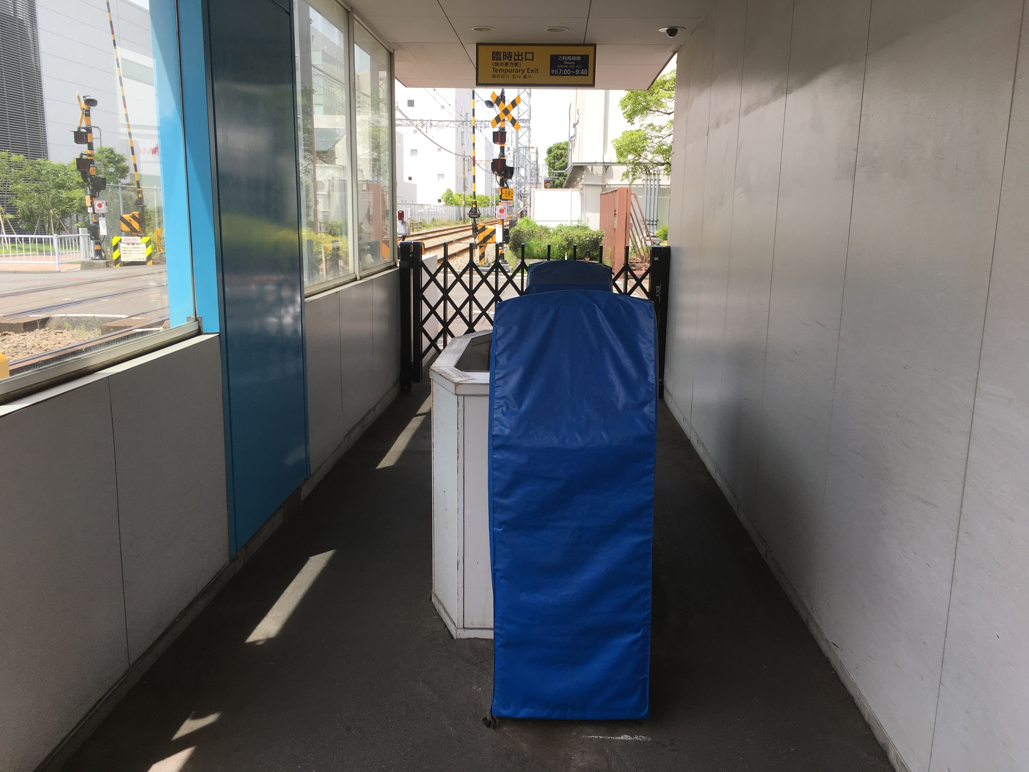 鈴木町駅の臨時出口にある改札口。